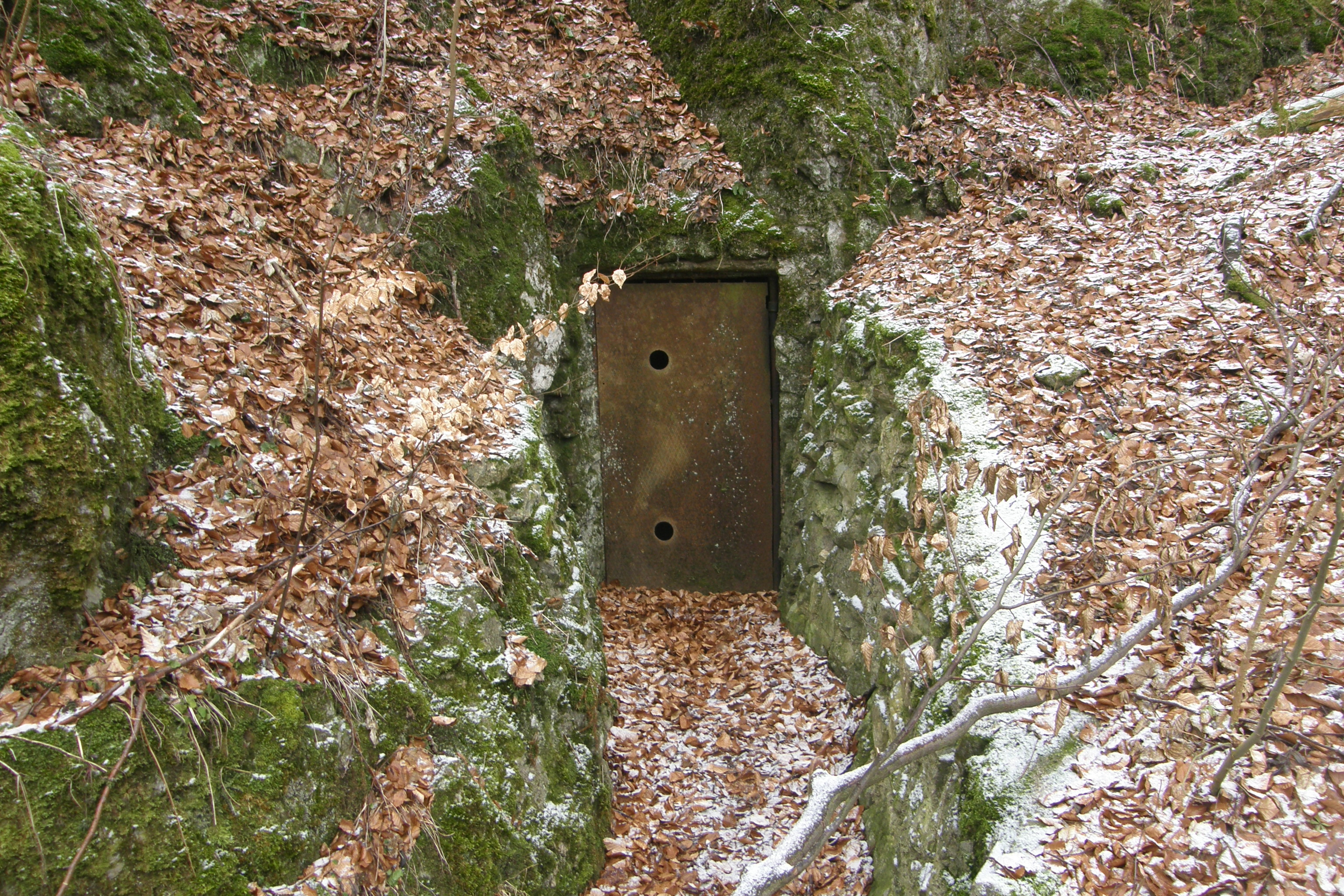 Vstup do Mariánské jeskyně v Moravském krasu